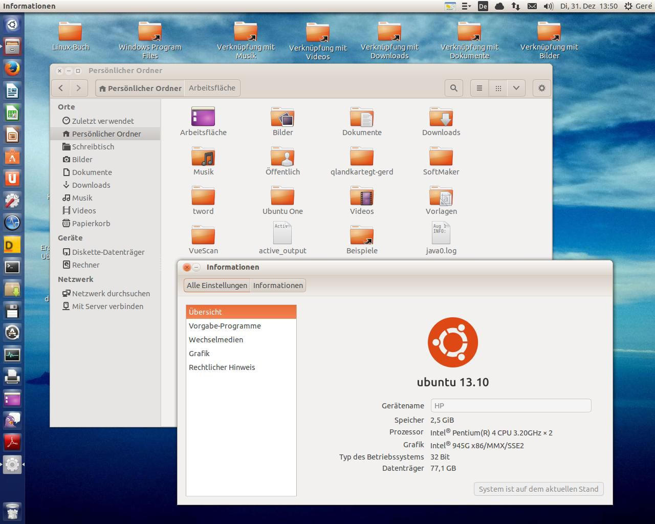 Ubuntu13.10deutsch